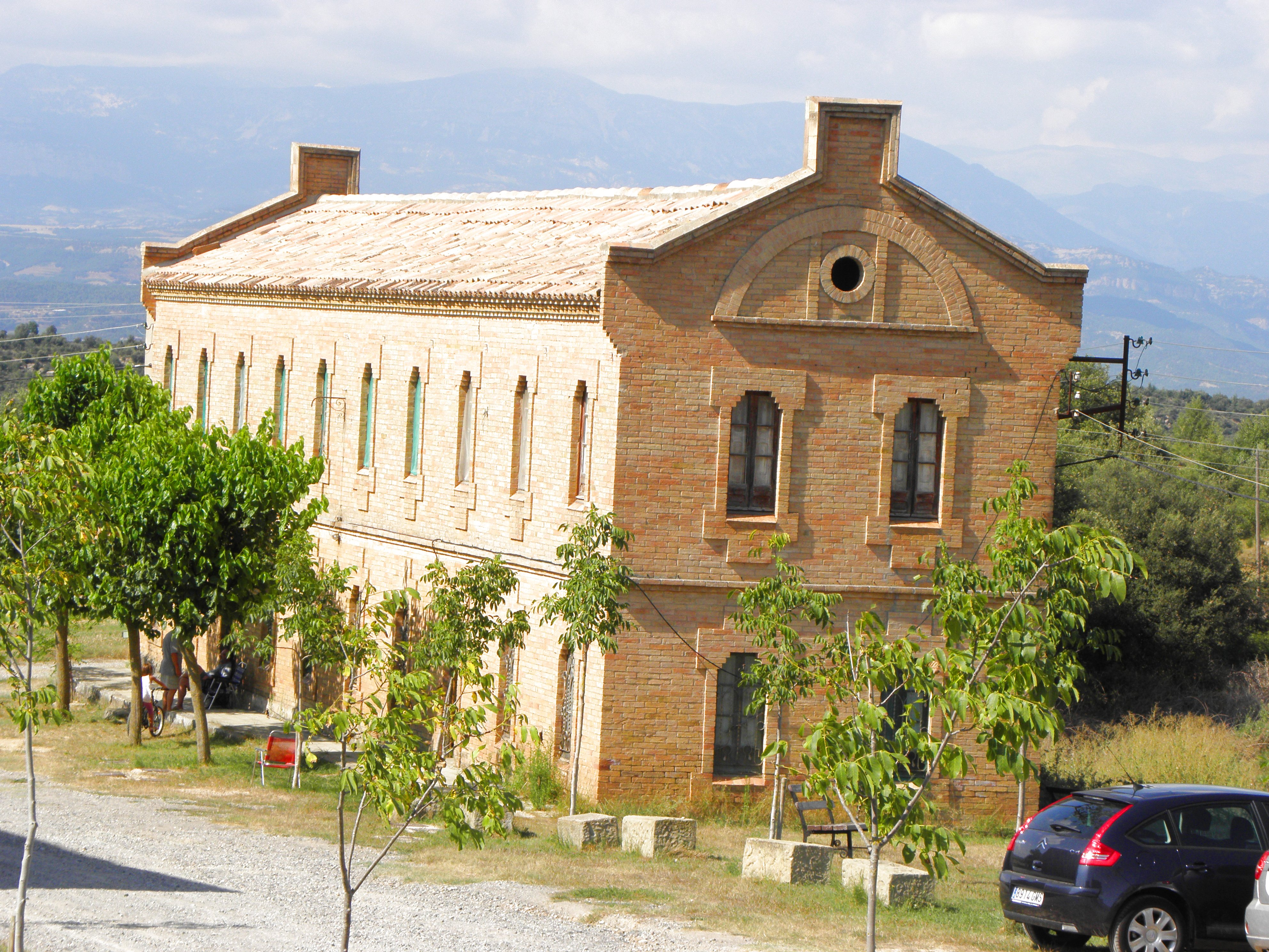 L'edifici de les cel·les de Sant Benet, al Santuari d'El Miracle (Riner, Solsonès)